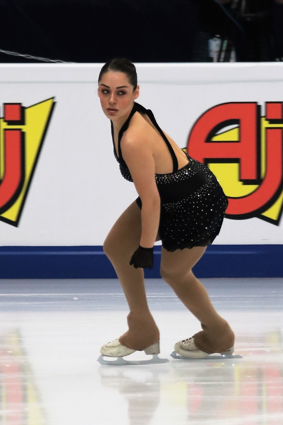 Сыла Сайгы (Турция) на Чемпионате Европы по фигурному катанию 2018